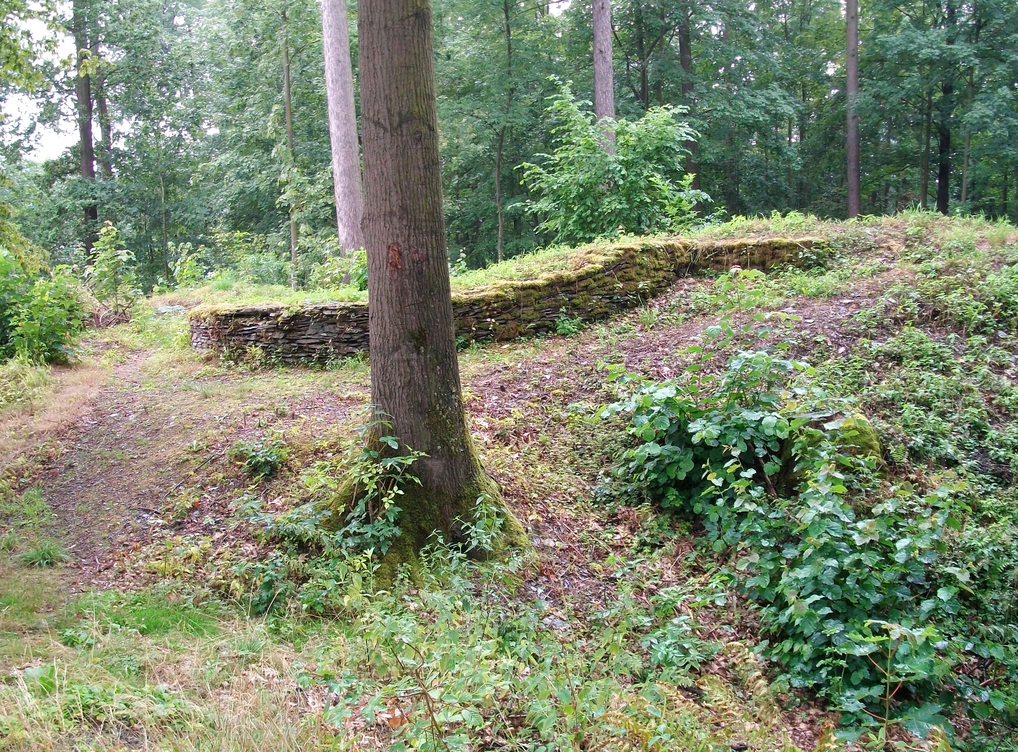 Hünenburg, Mauer der Vorburg, Meschede (Germany)